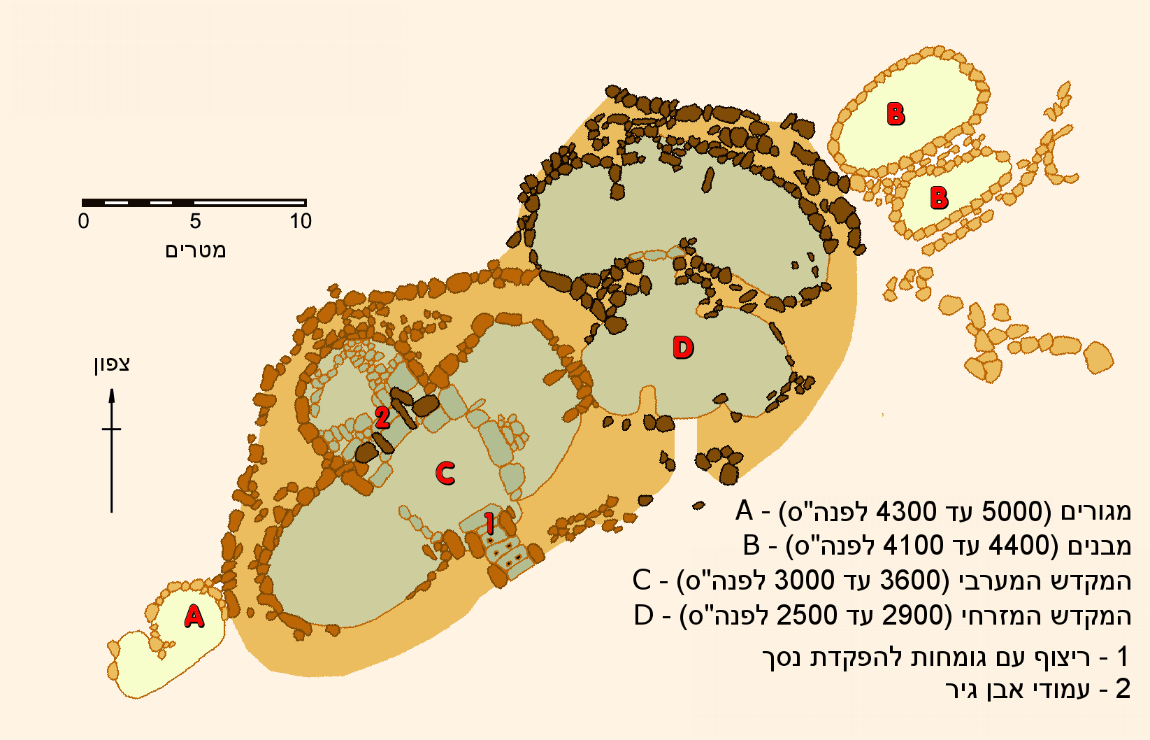 Plan du site de Skorba HEB